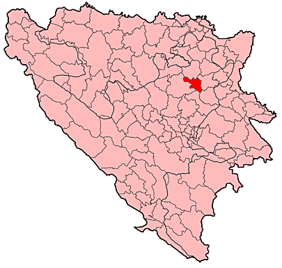 Prikaz općine Banovići u Bosni i Hercegovini